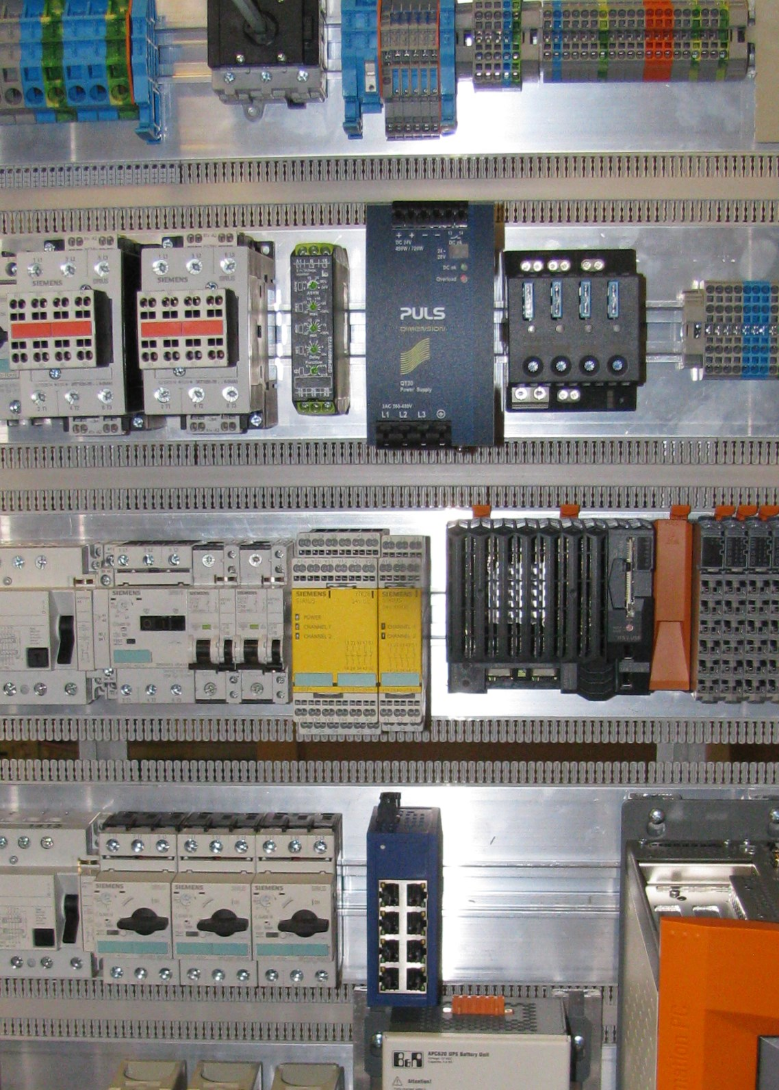 Verdrahtungssysytem, bestückt, aber ohne Verdrahtungen